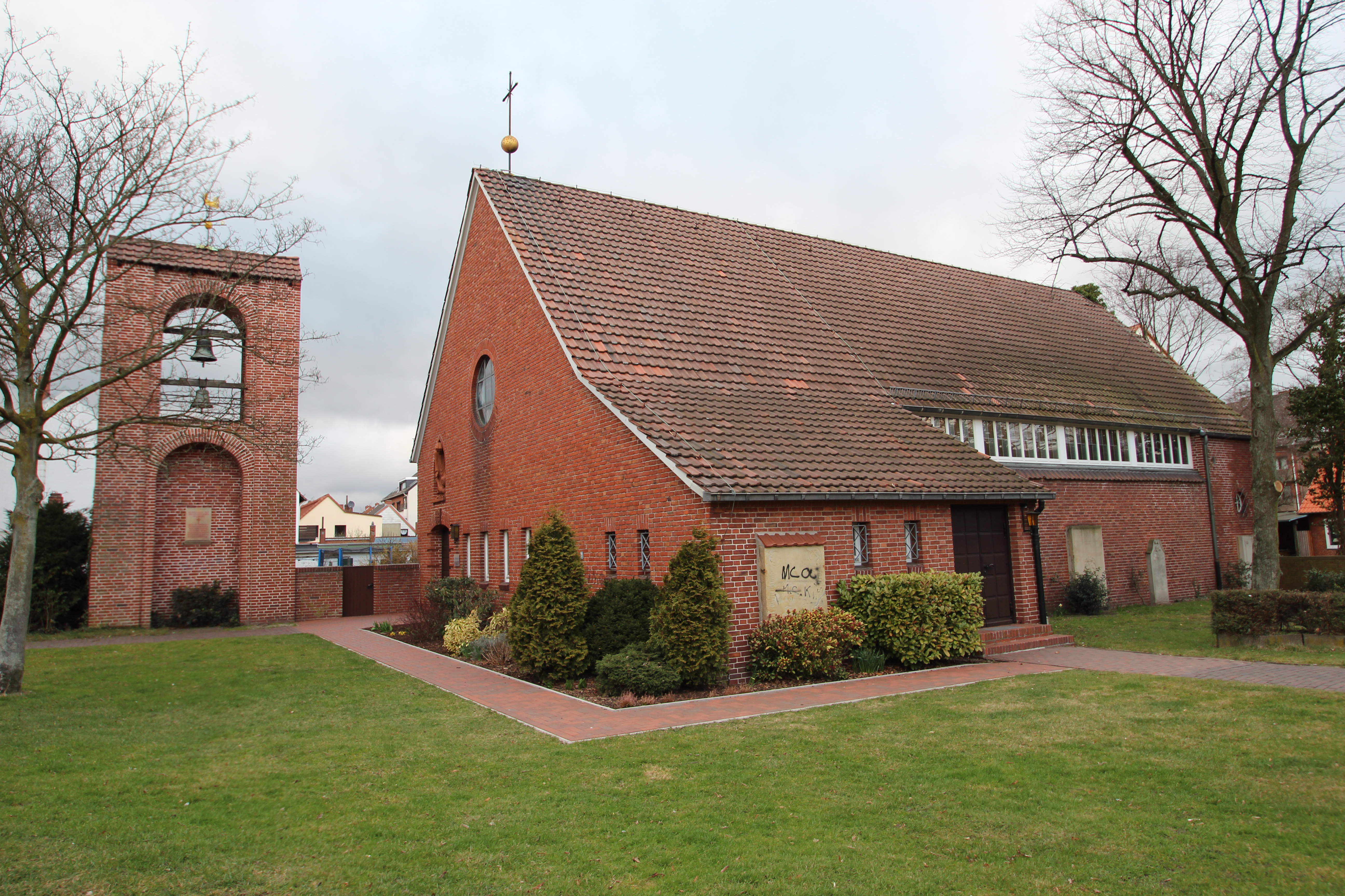 St. Andreas Kirche in Bremen, Danziger Straße 20. Das abgebildete Objekt ist ein geschütztes Kulturdenkmal in der Freien Hansestadt Bremen, mit der Nr. 0291 beim Landesamt für Denkmalpflege registriert.